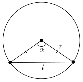 Длина хорды